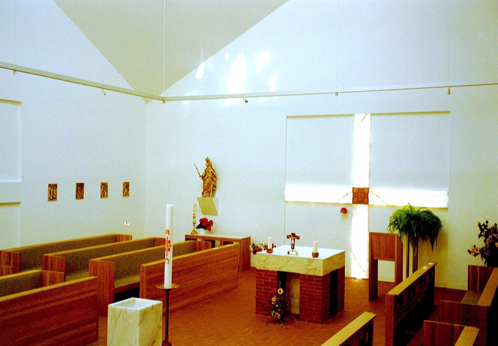 Kath. Kirche St. Kilian in Bad Liebenstein (Blick in den Kirchenraum)